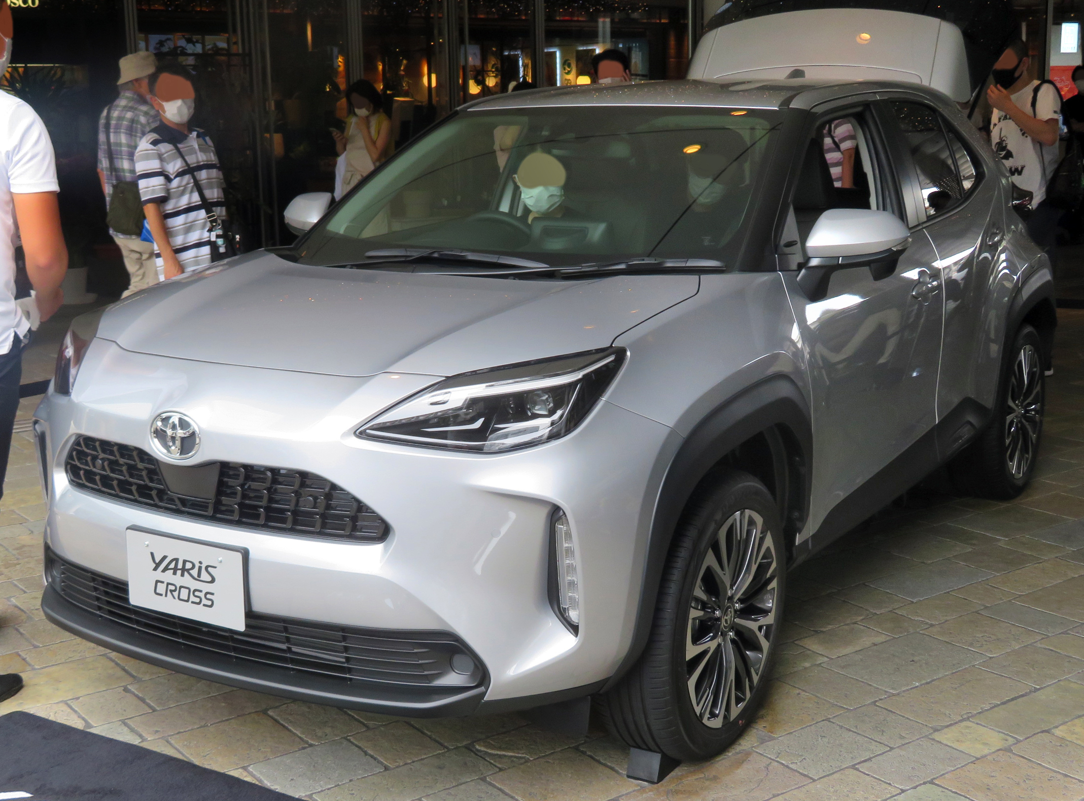 3BA-MXPB10型トヨタ・ヤリスクロスZ 2WDをフロントから撮影。